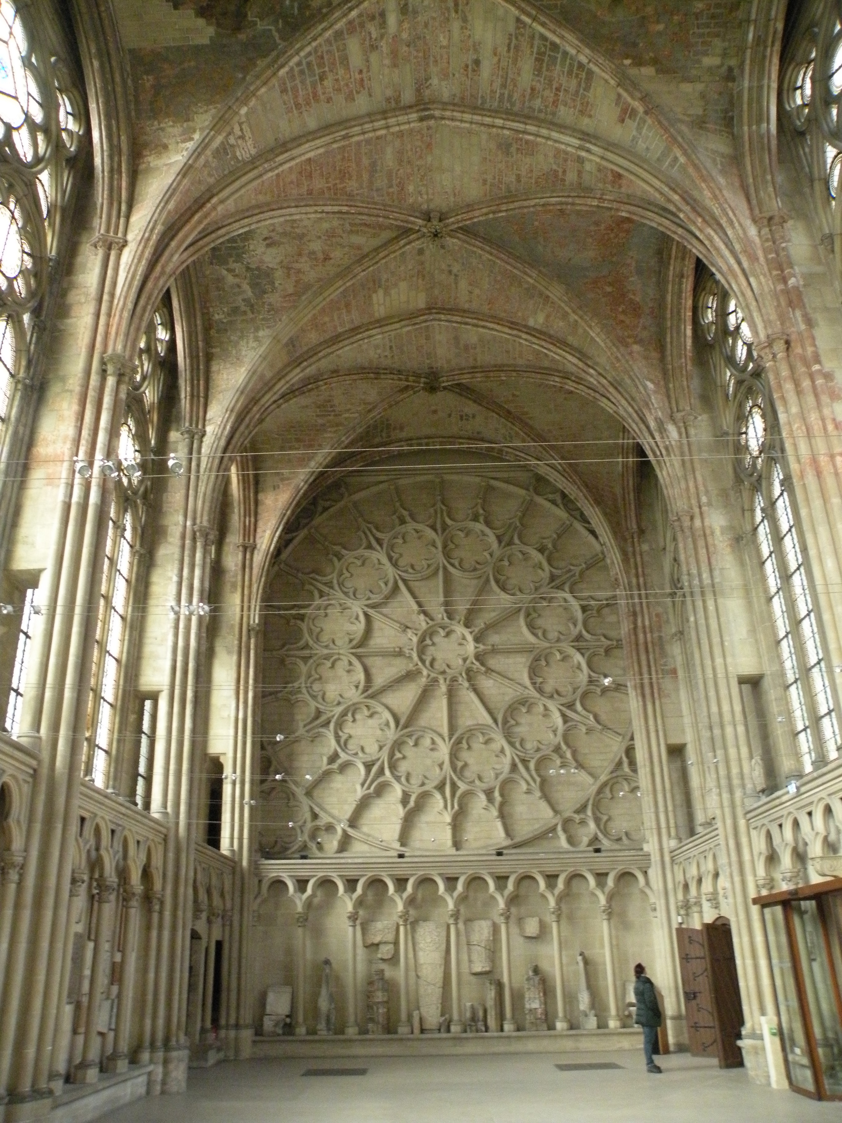 Intérieur de la Sainte-Chapelle (Saint-Germain-en-Laye)